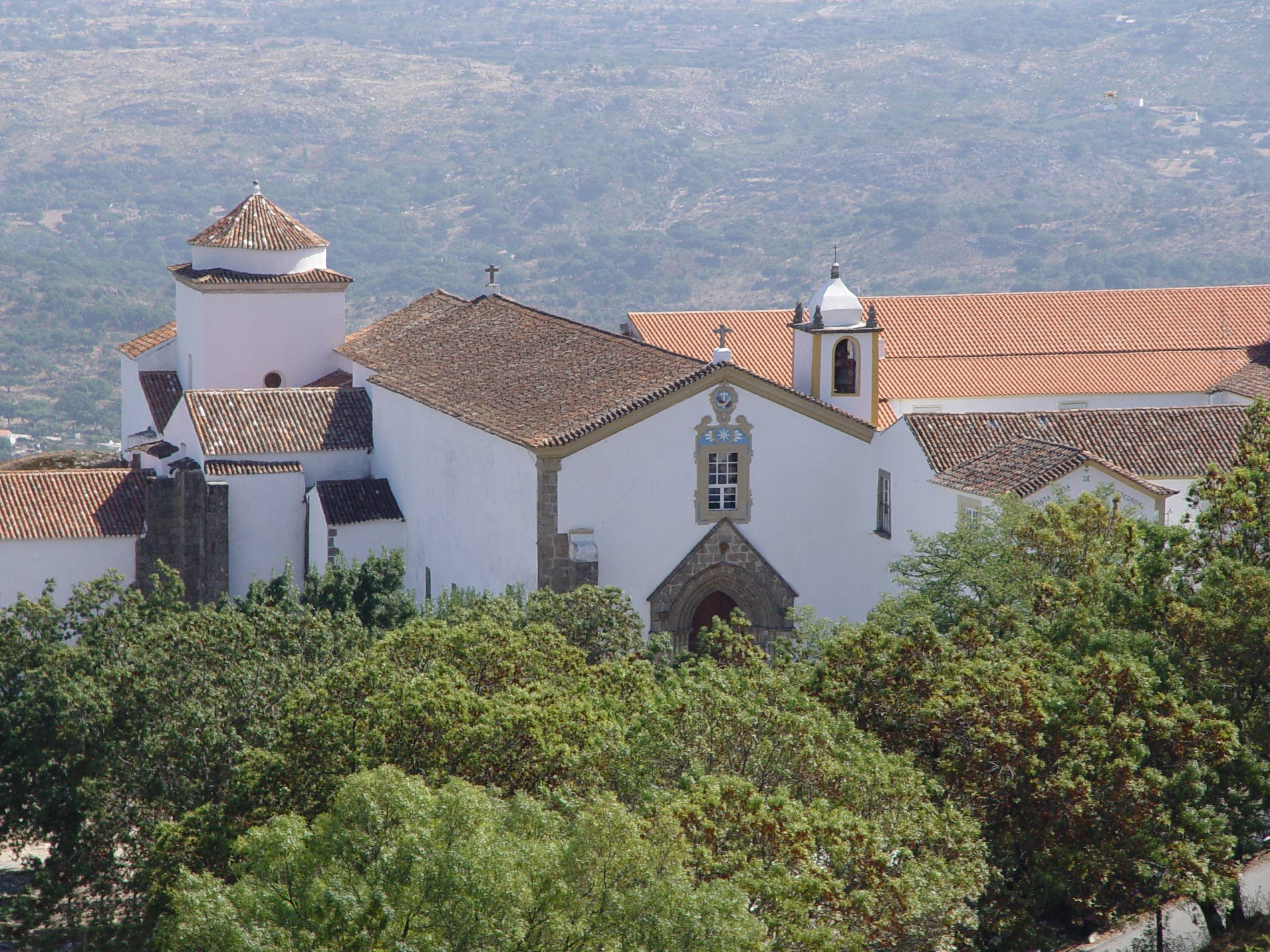 Convento Nossa Senhora da Estrela, in Marvao, Portugal